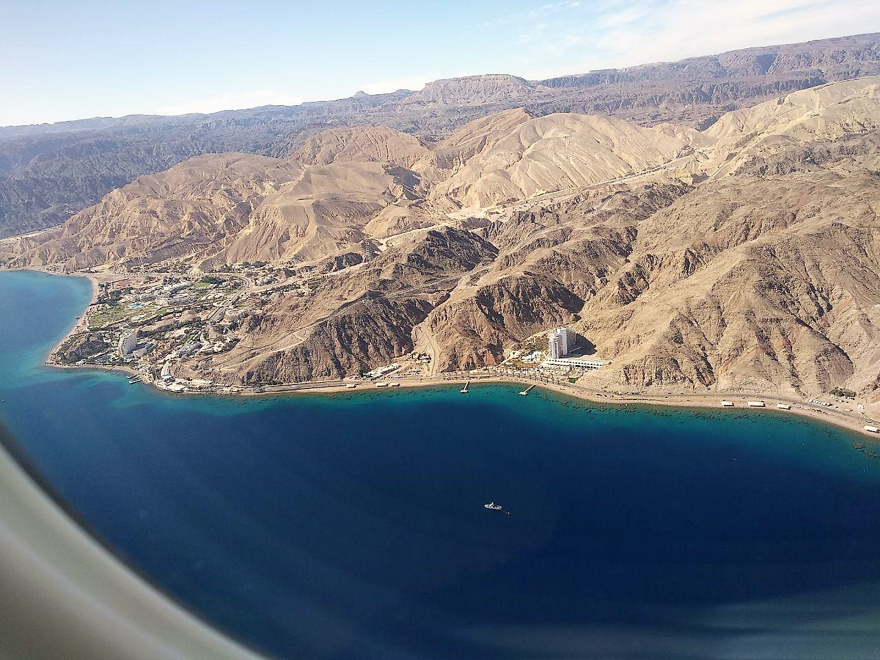 צילום אוויר לכיוון טאבה ממטוס הטס לאילת (במהלך הסיבוב מעל הים)